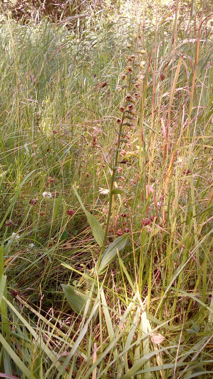 Eine Ständelwurz im Katinger Watt an der Schutzgebietsgrenze (Stichweg zwischen Wald und Leitdamm)